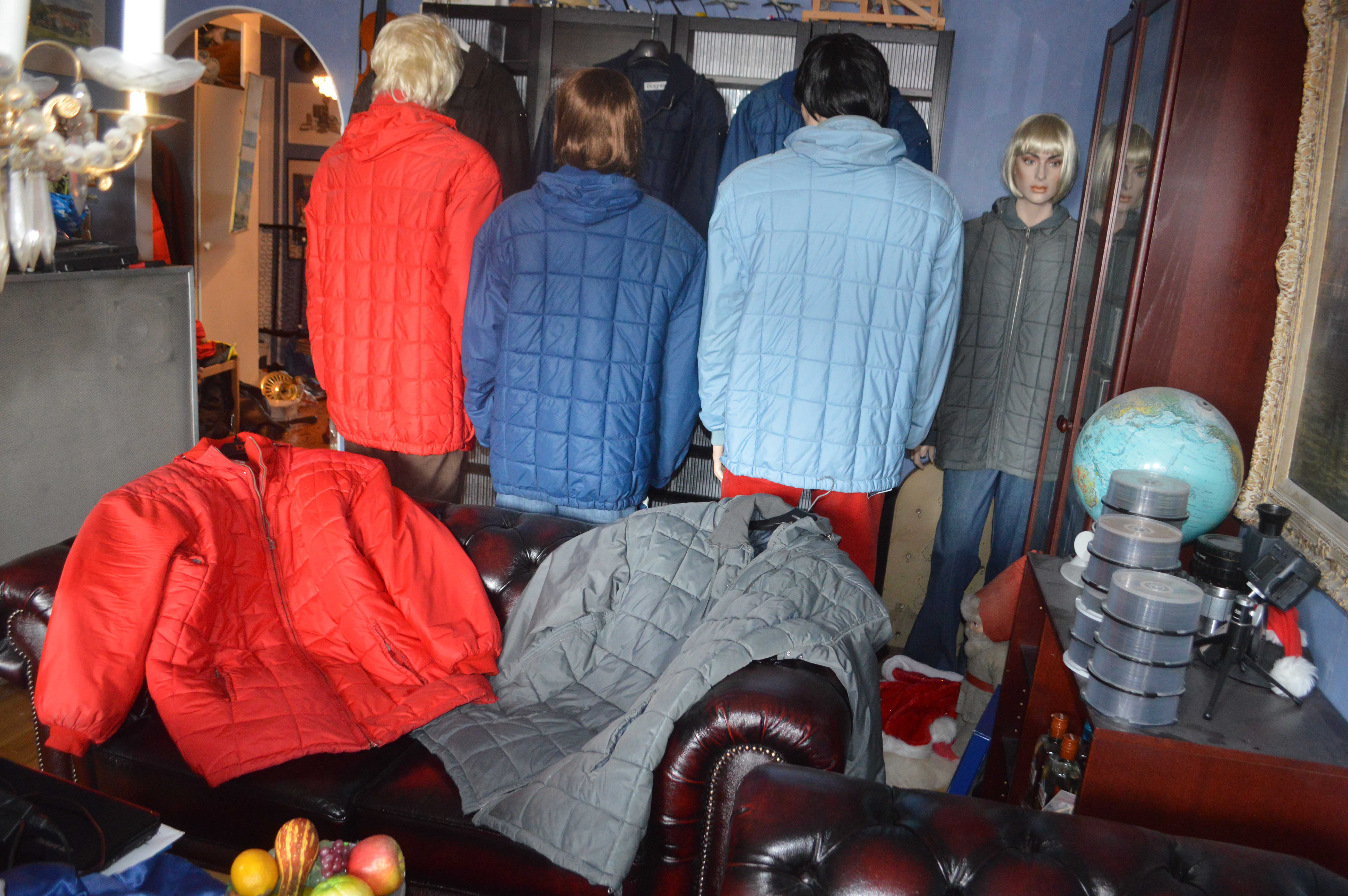 BOGNER